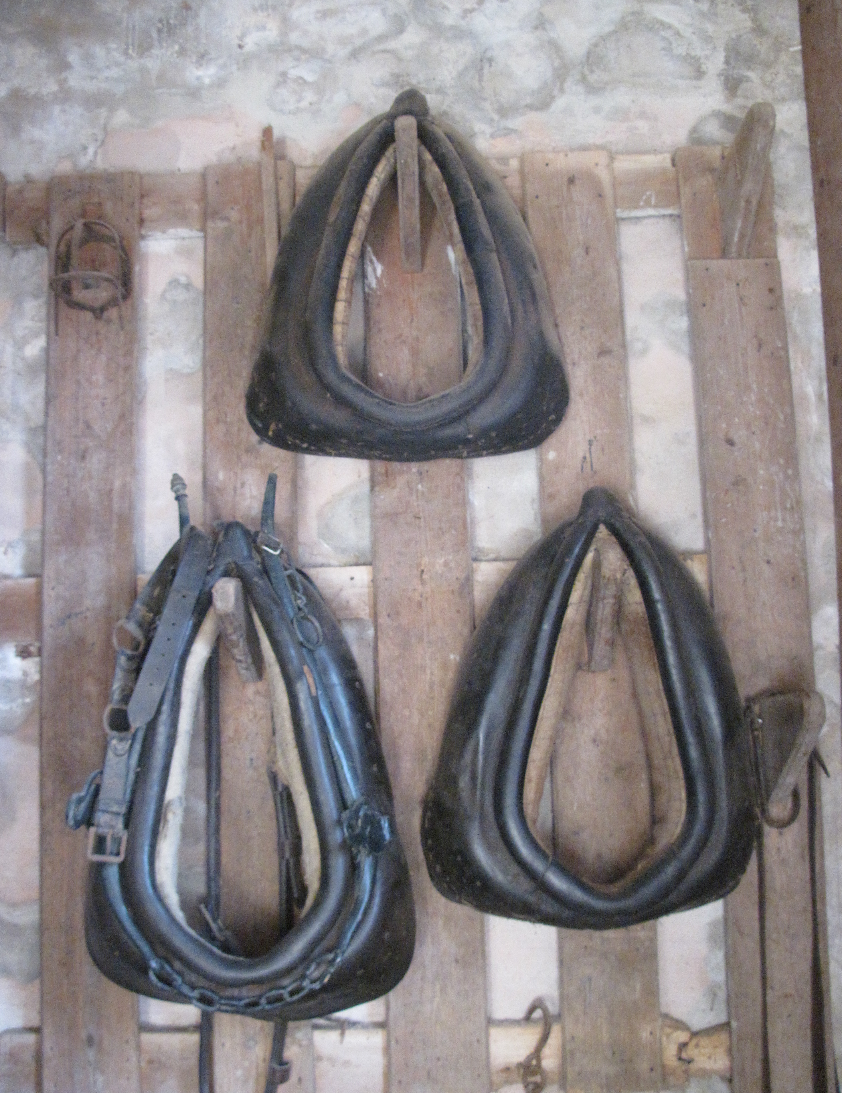 Nrf: Faîs'sie d'Cidre, 17-18 d'Octobre 2009, Jèrri